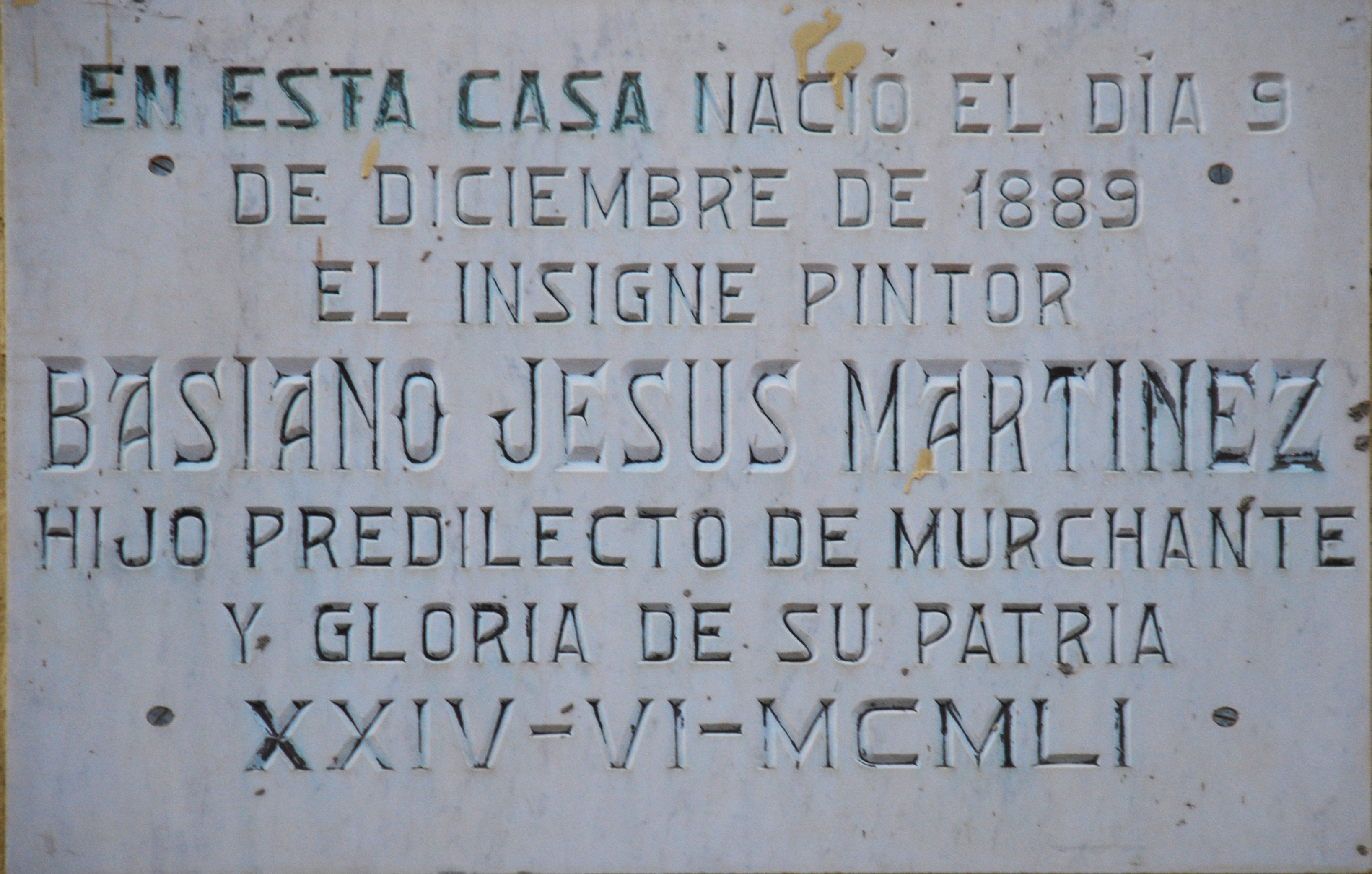 Placa conmemorativa en la casa natal de Basiano en Murchante